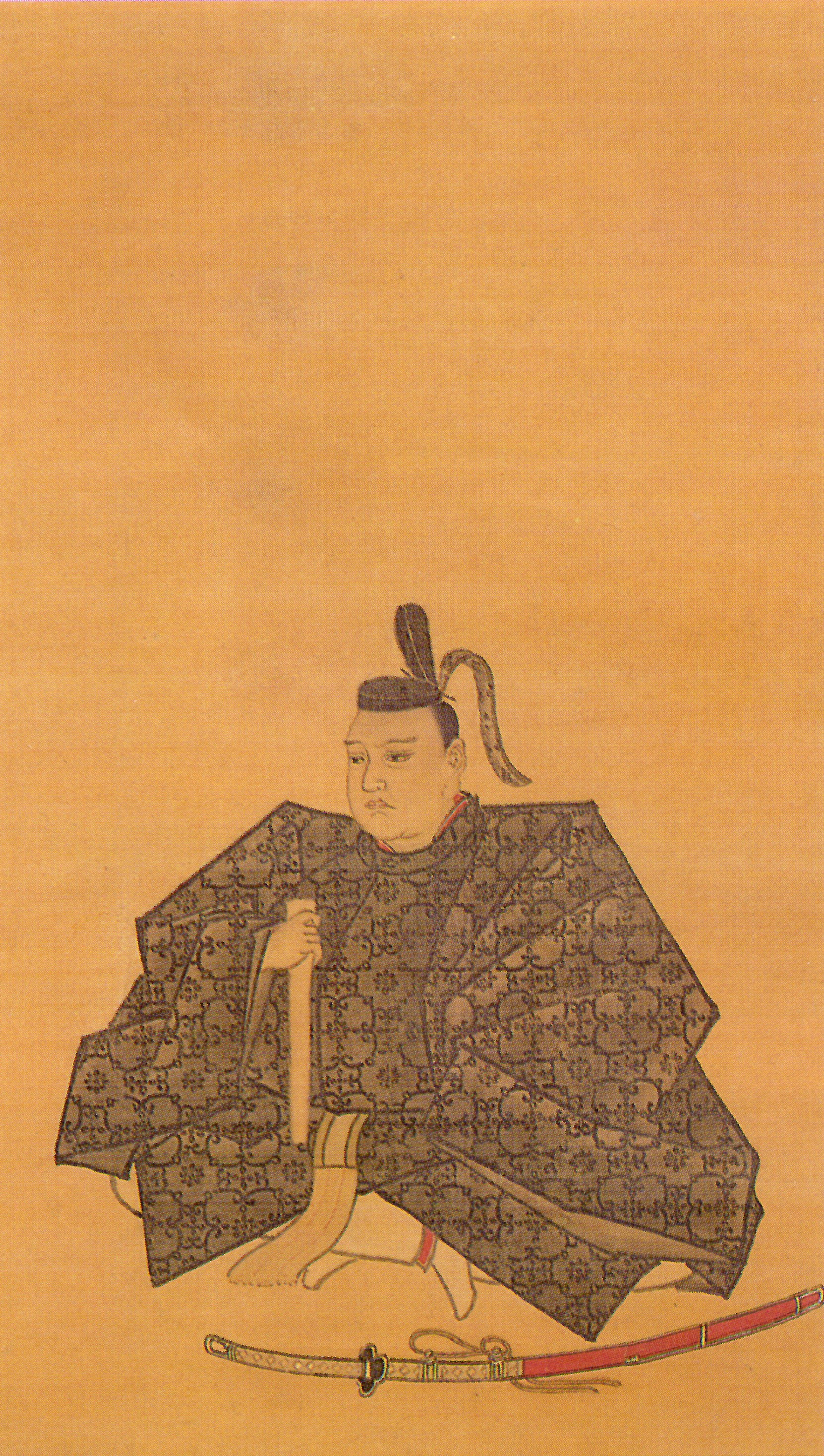 黒田綱之(黒田光之の長男)の肖像。